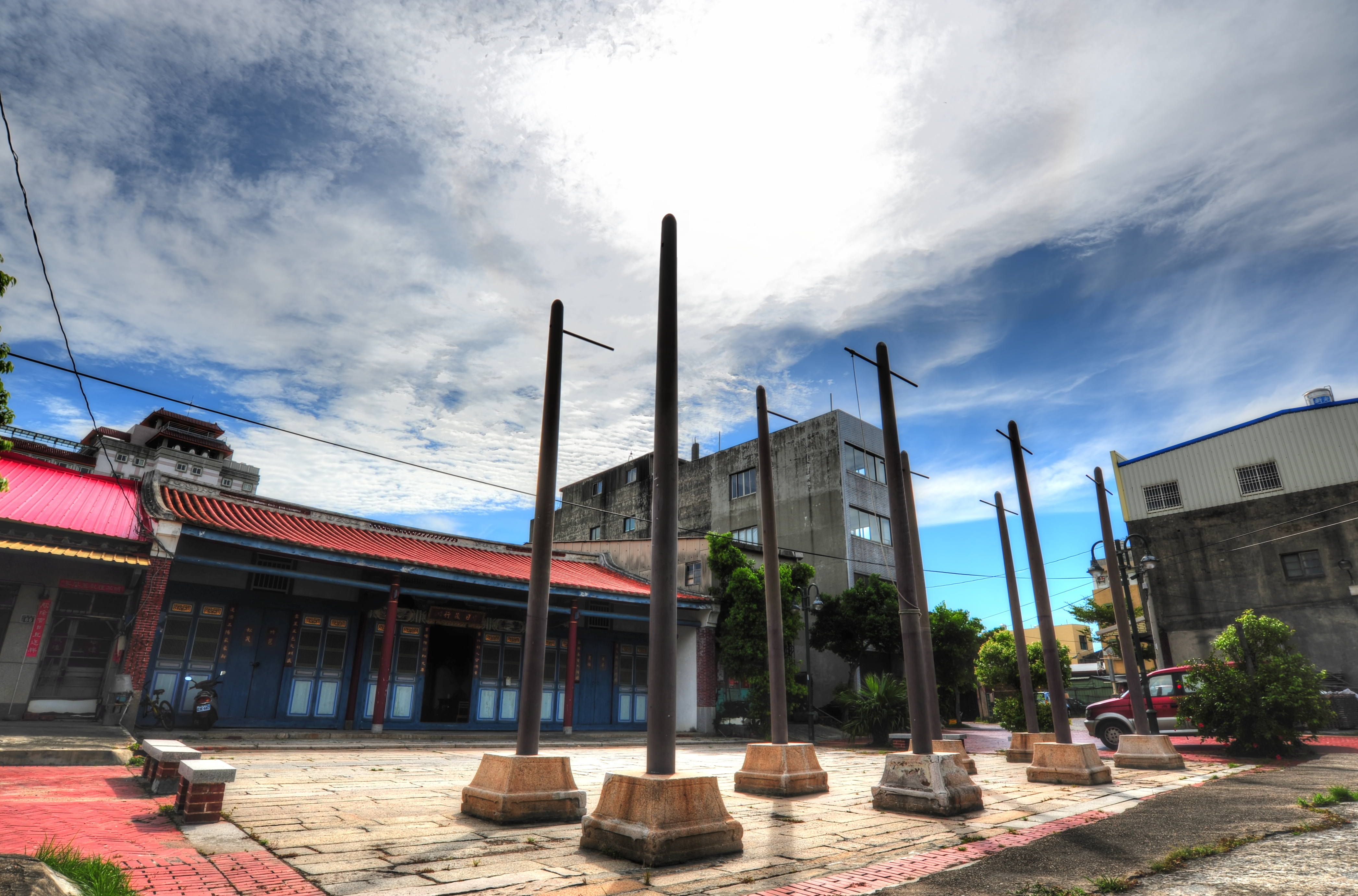 鹿港八郊中的泉郊裡最大的船頭行